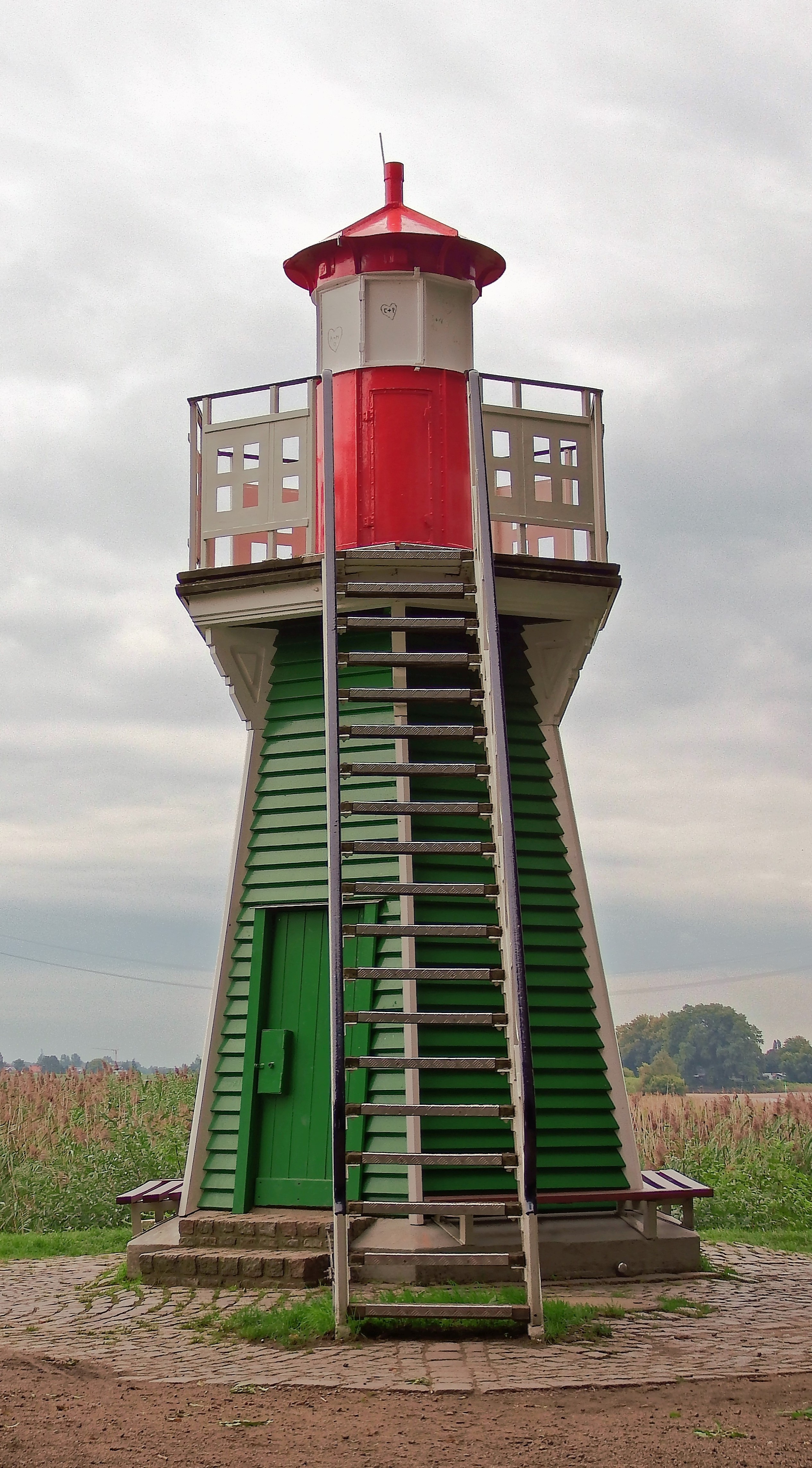 Das Leuchtfeuer Bunthaus auf der Bunthäuser Spitze auf Moorwerder zeigt sich am 22.09.2015 erfreulicher Weise wieder graffitifrei.This is a photograph of an architectural monument. (1457)